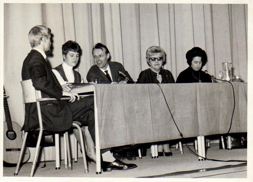 Ke Riema in een panel met o.a. Lutgart Simoens en Jos Boudewijn